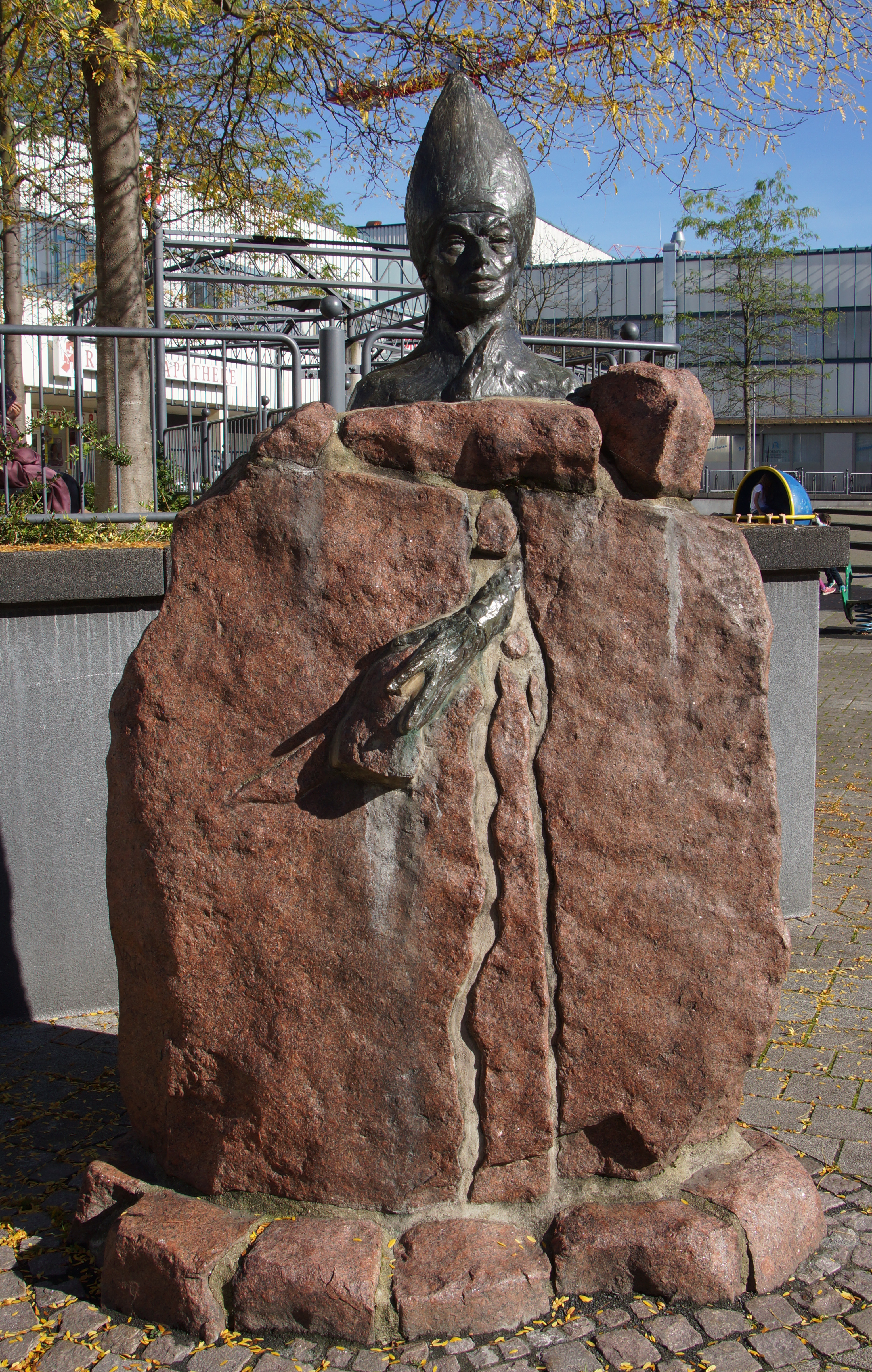 Statue Augustinus (1982) in St. Augustin